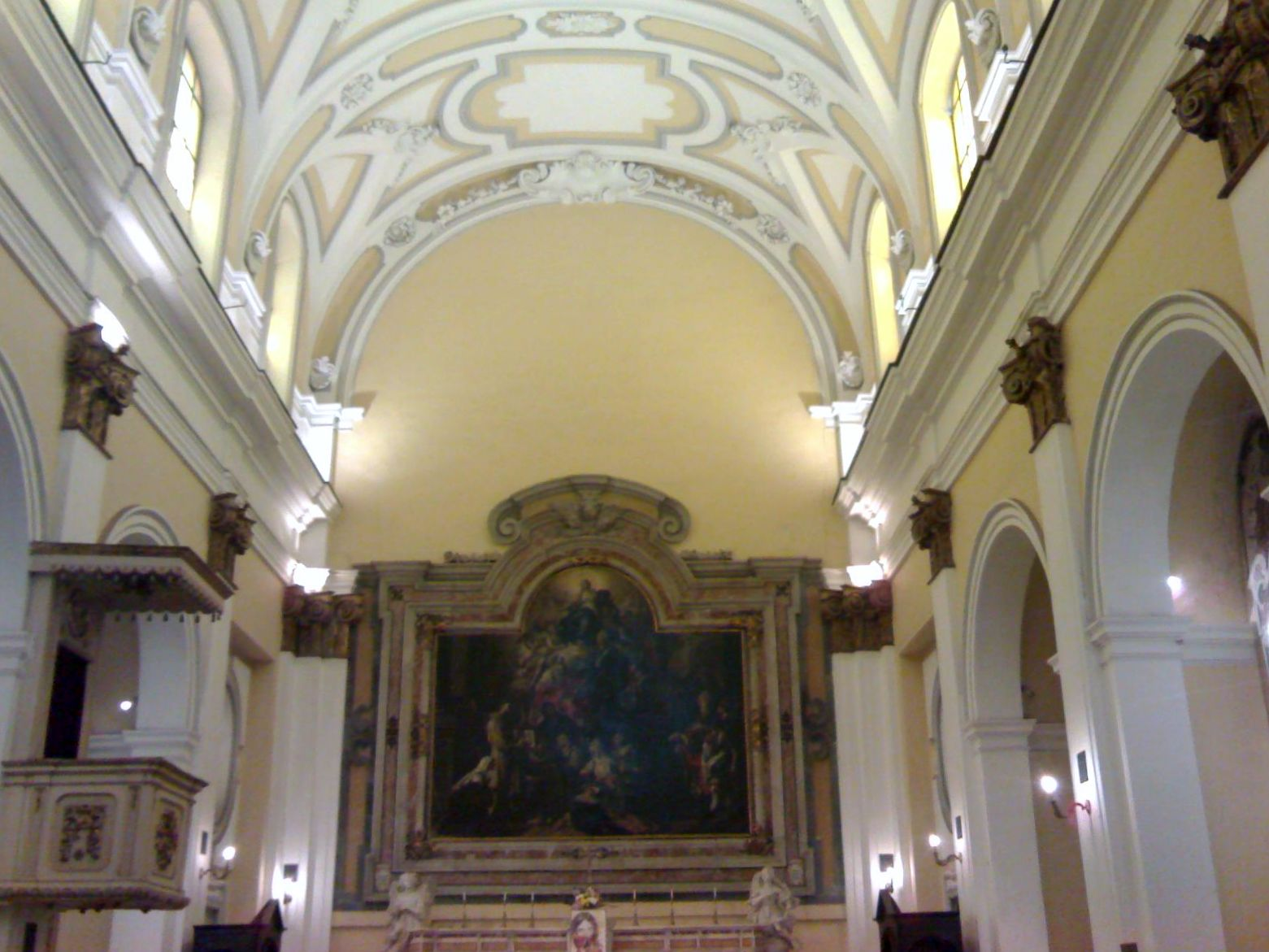 Chiesa di San Girolamo delle Monache (Napoli)